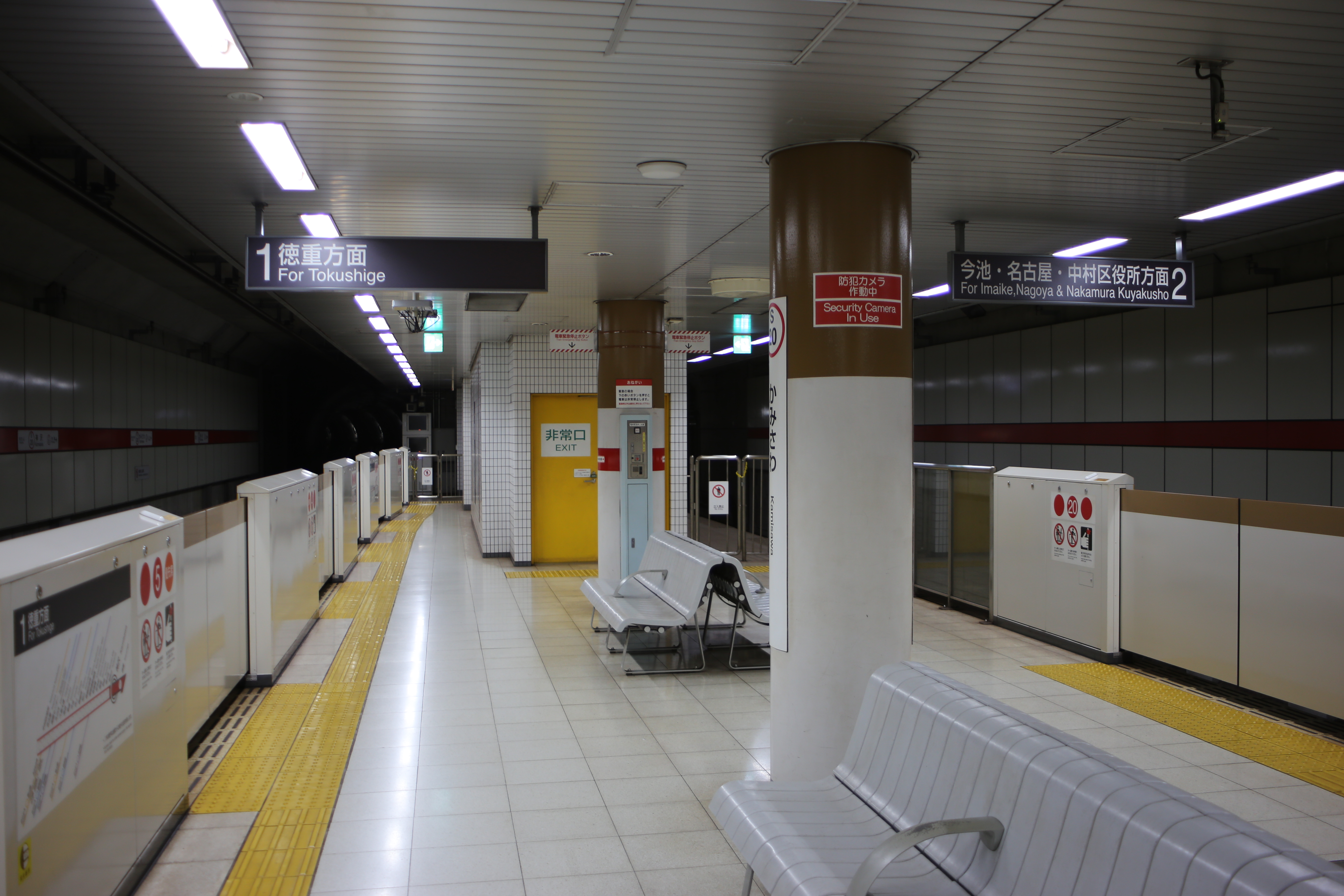 名古屋市緑区神沢一丁目の名古屋市営地下鉄桜通線神沢駅